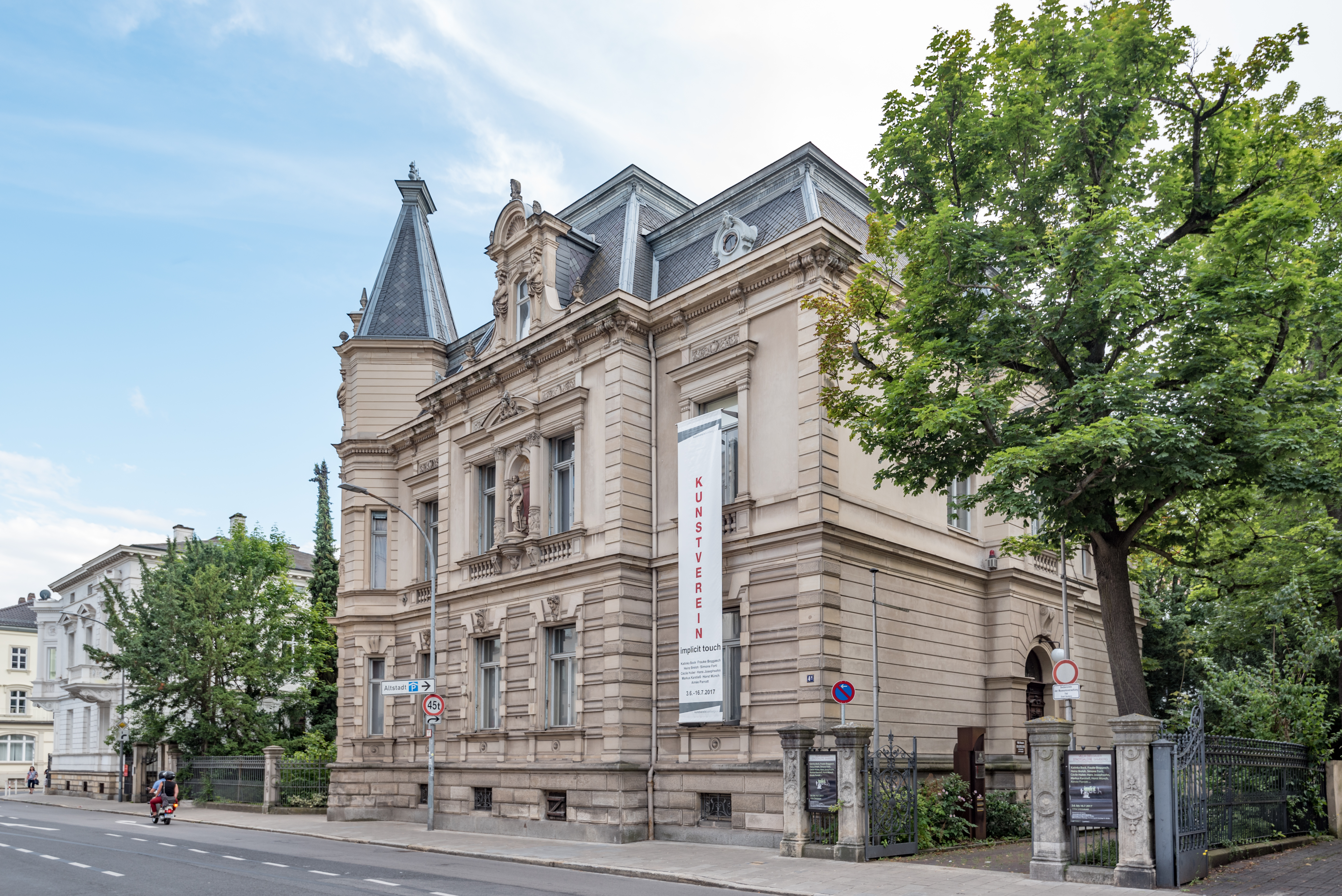 Bamberg, Hainstraße 4a